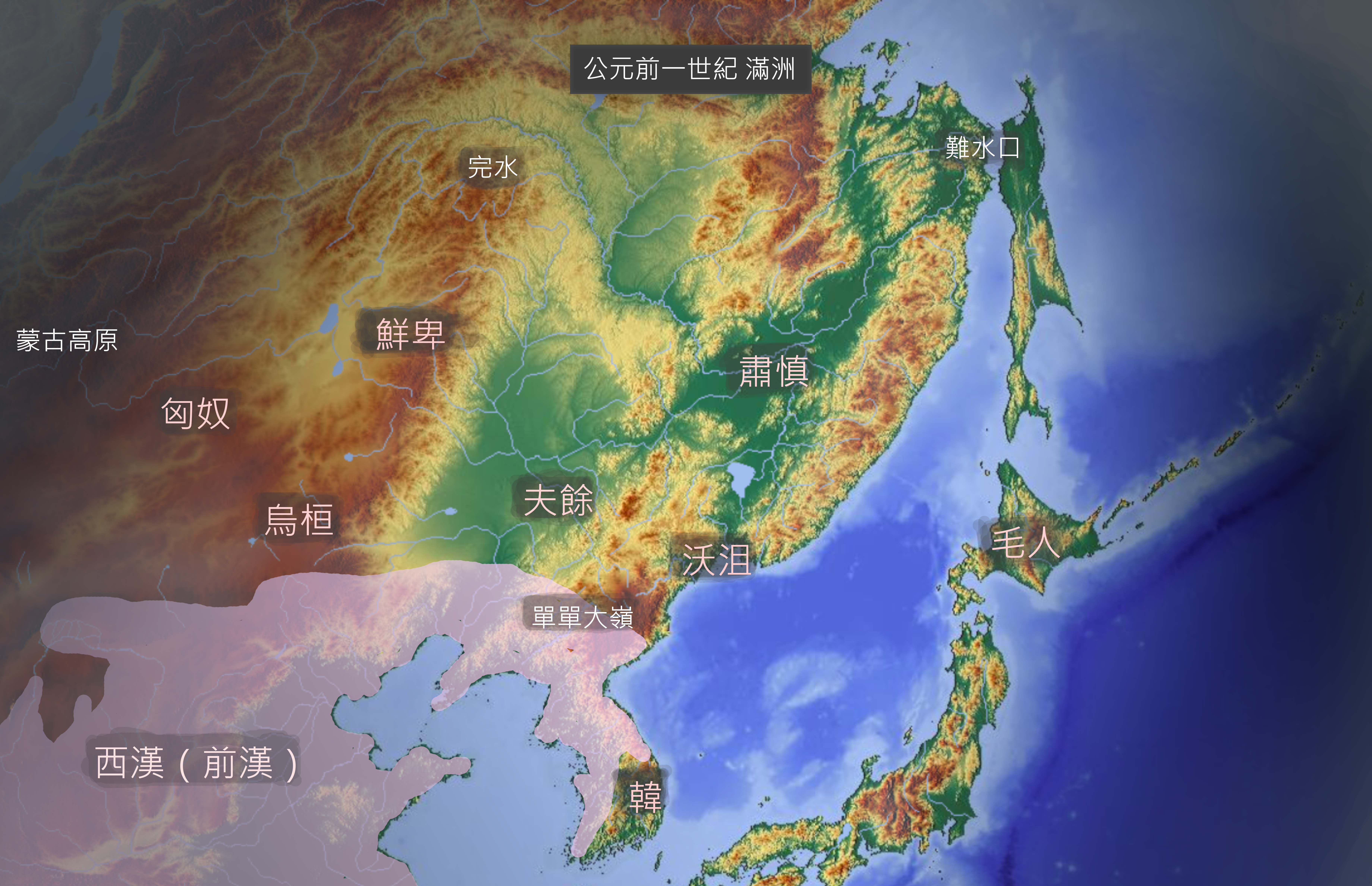 公元前一世紀左右，西漢東北部諸國。